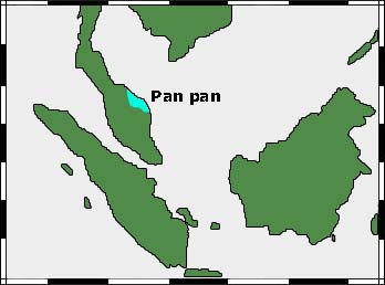 Pan Pan kingdom